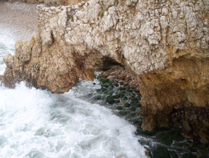 Això està just a tocar del Restaurante Vivero. El mar estava bastant encabronat i era bonic de mirar com esquitxaven les onades.